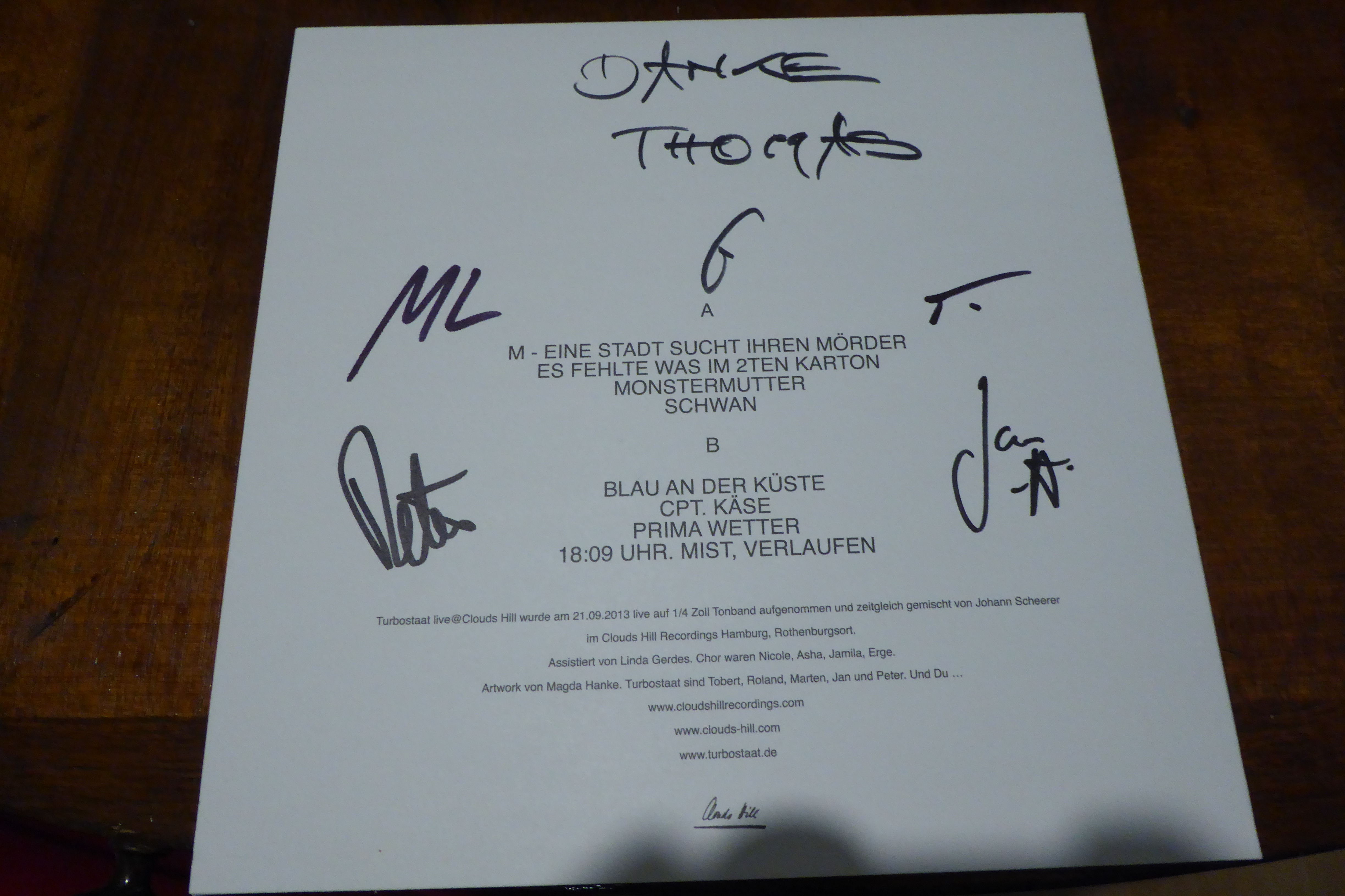 Rückseite eines von den Bandmitgliedern von Turbostaat unterzeichneten und gewidmeten Albums